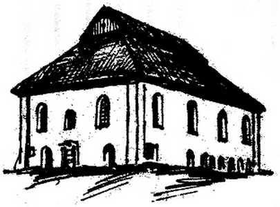 Беларуская (тарашкевіца): Лоша (Łoša). Сынагога